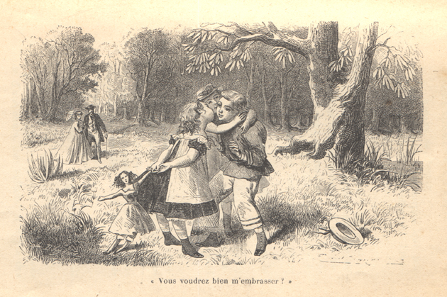 Illustration by Émile Bayard (1837-1891) for "François le bossu" by Sophie Rostopchine, Comtesse de Ségur (1799-1874). "Vous voudrez bien m'embrasser?" ("Would you like to give me a kiss?")